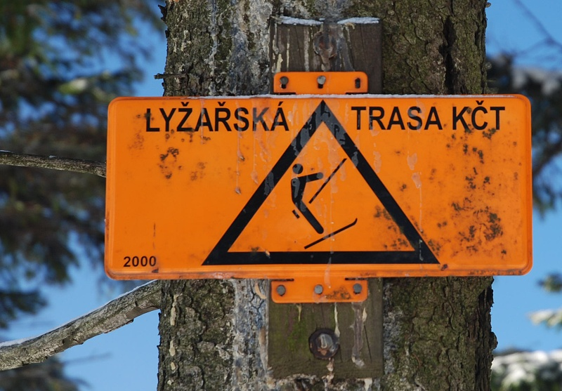 Turistická značka KČT v Jeseníkách